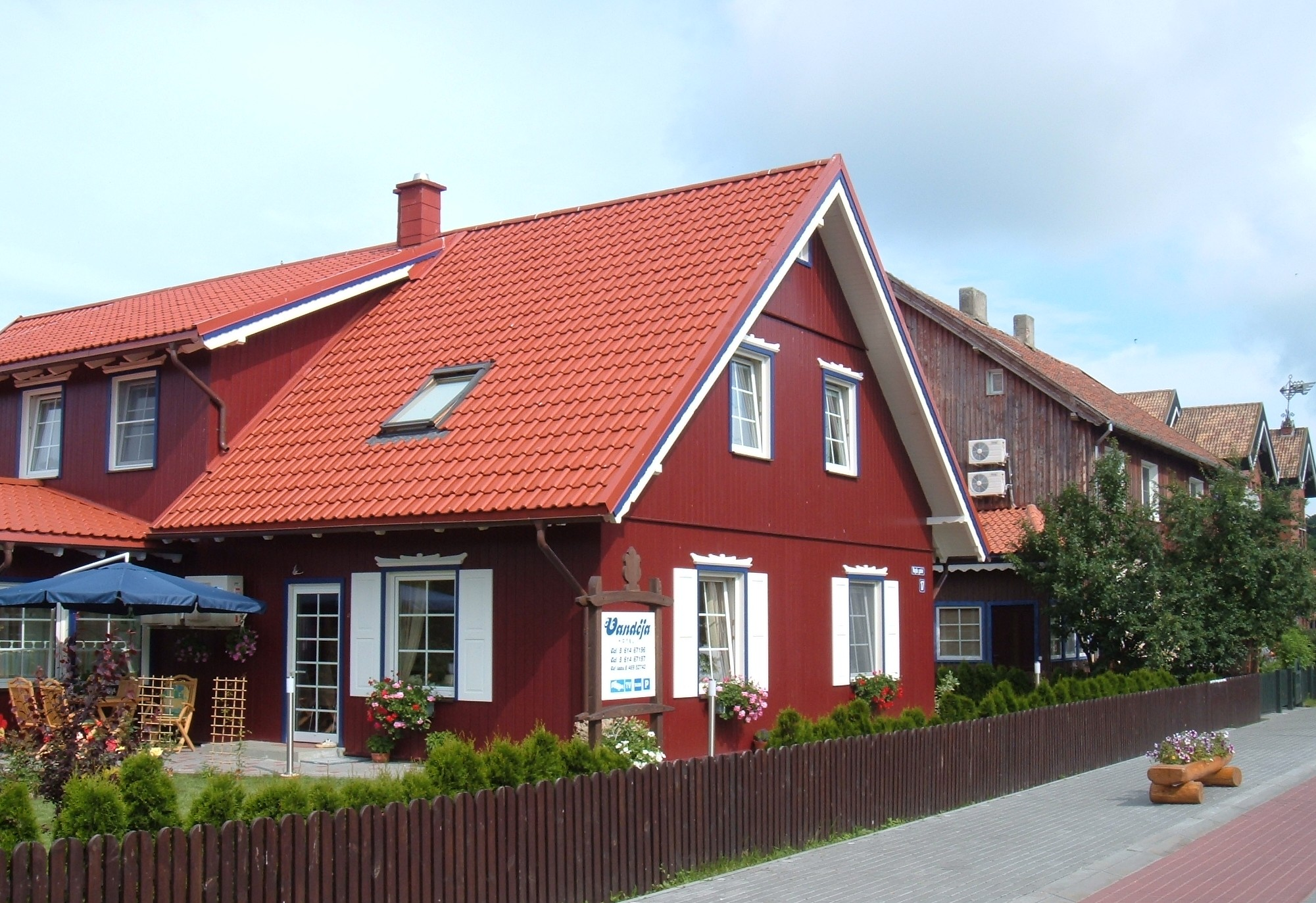 Дом в Ниде начала ХХ века, в наше время гостиница